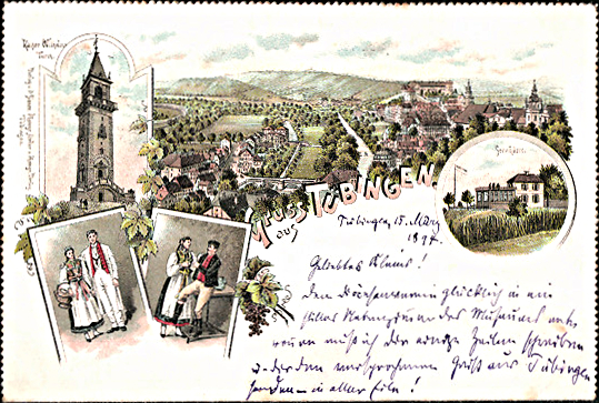 Postkarte "Gruß aus Tübingen": Kaiser-Wilhelm-Turm, Trachten, die Gaststätte Sennhütte und der Blick auf Tübingen von der Sennhütte aus (Farblithographie nach Fotografien)